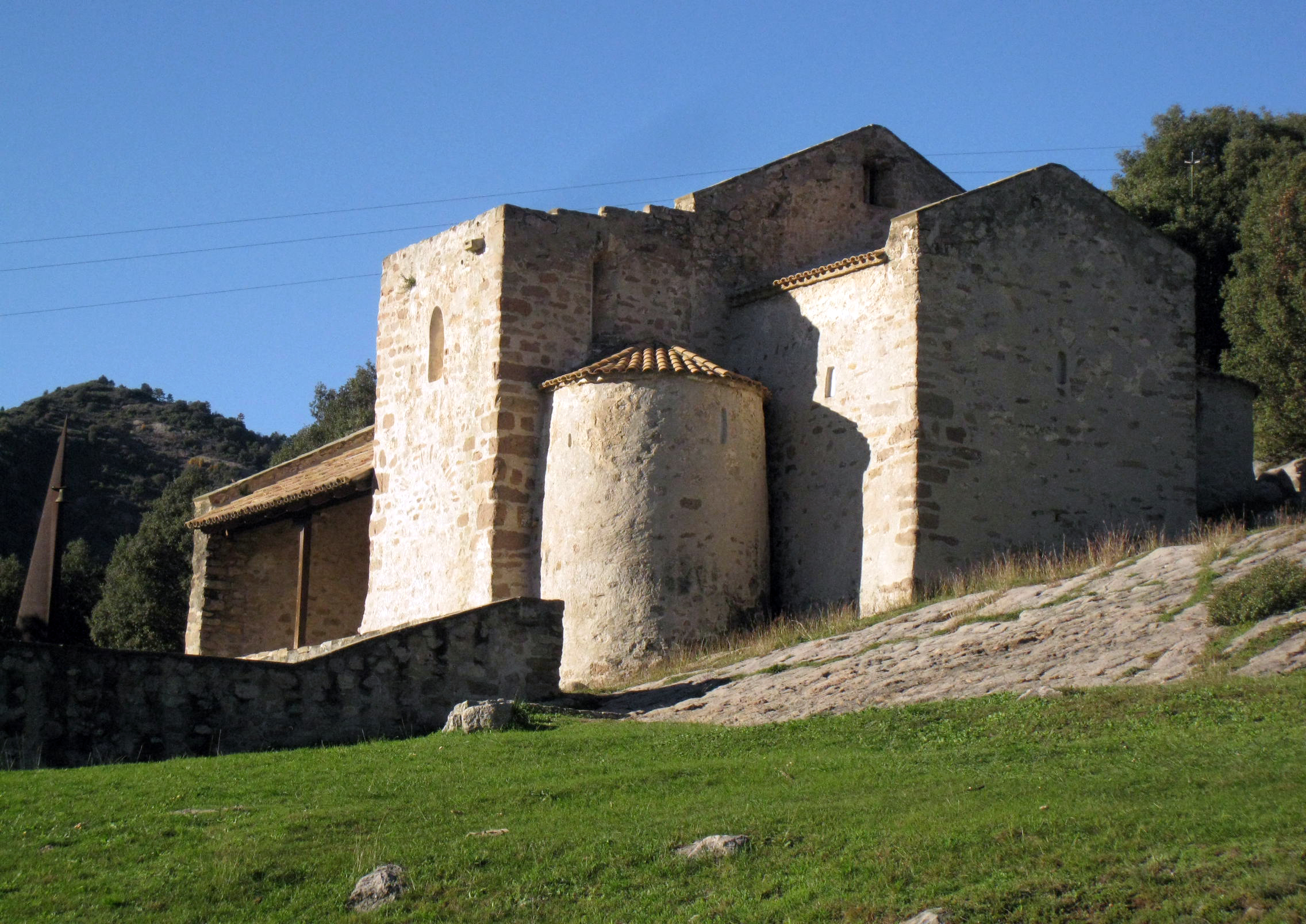 Església de Sant Quirze de Pedret (Cercs) Object location42° 06′ 26.93″ N, 1° 53′ 01.16″ E